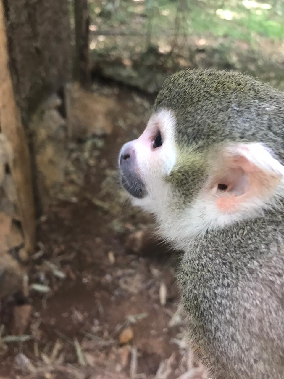 Foto de perfil de um Saimiri, tirada no zoológico de Gramado